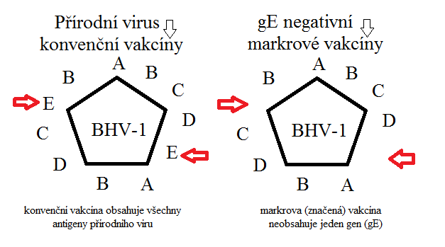 IBR protilátky u markrové vakcíny